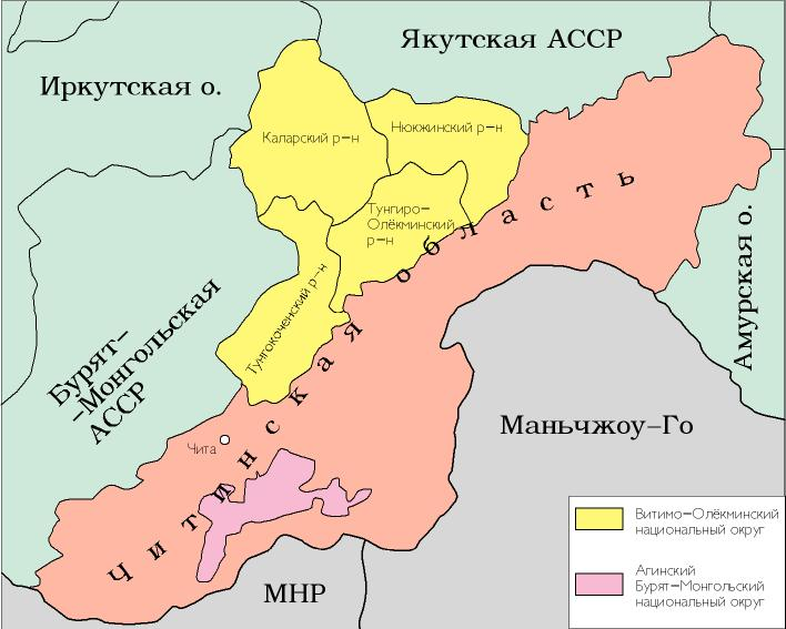 Карта Витимо-Олёкминского нац. округа в 1937 году